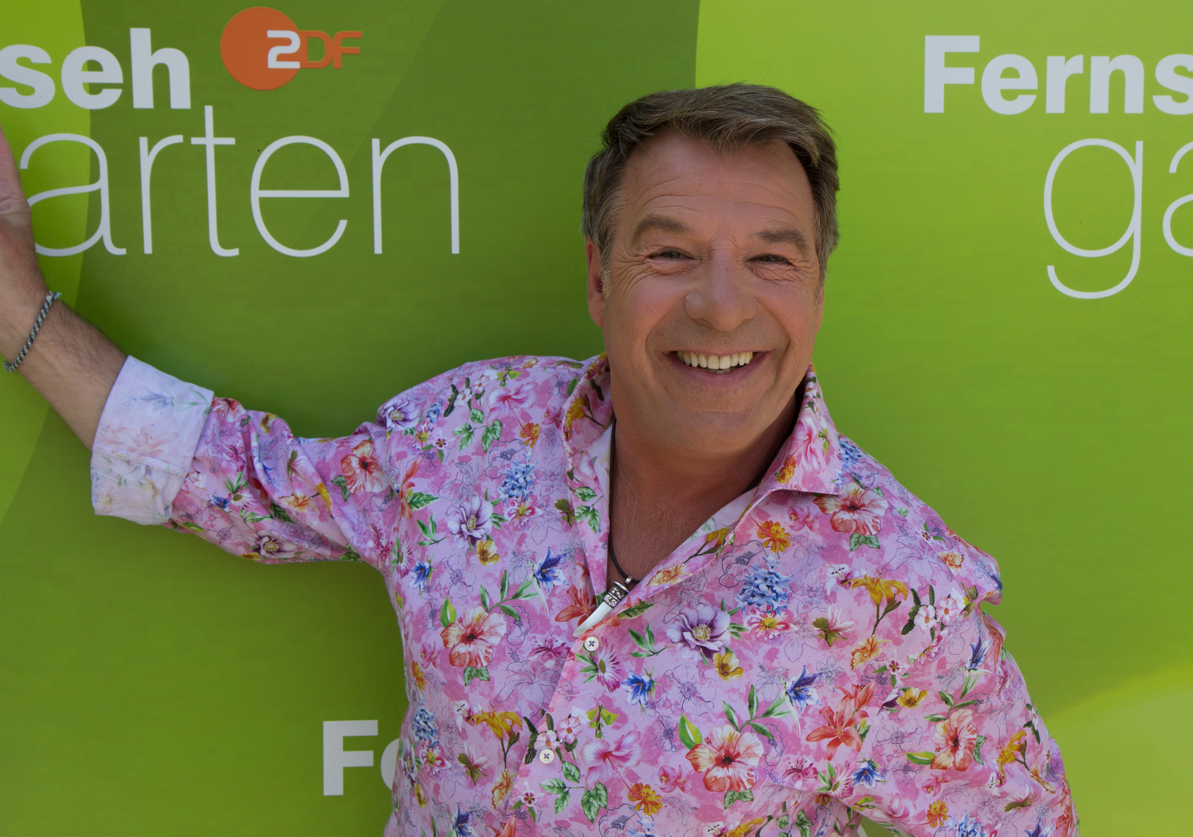 Patrick Lindner als Gast beim ZDF-Fernsehgarten am 21. Mai 2018 in Mainz.